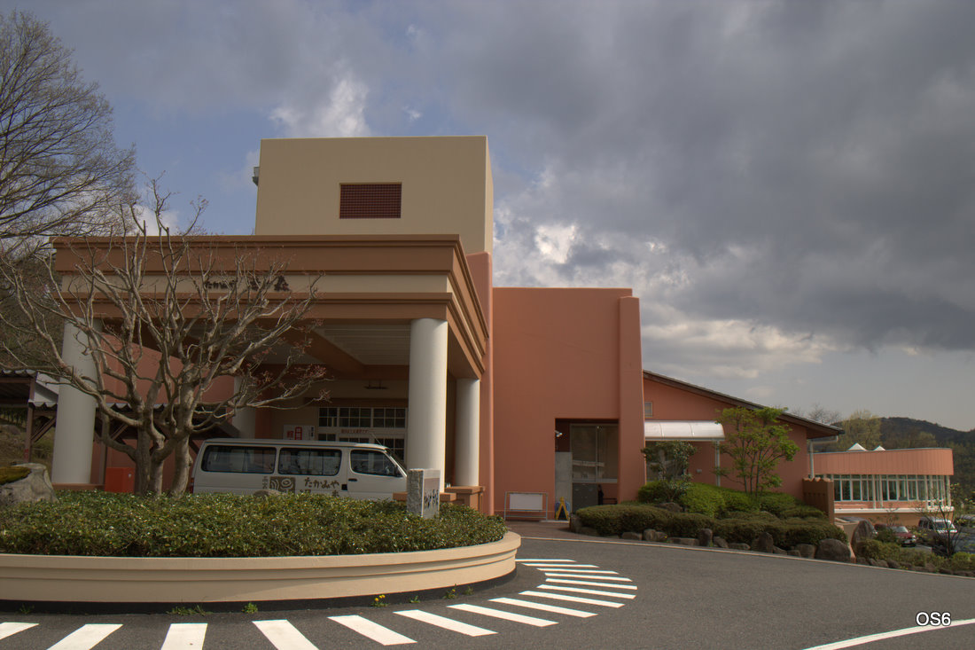 広島県たかみや湯の森